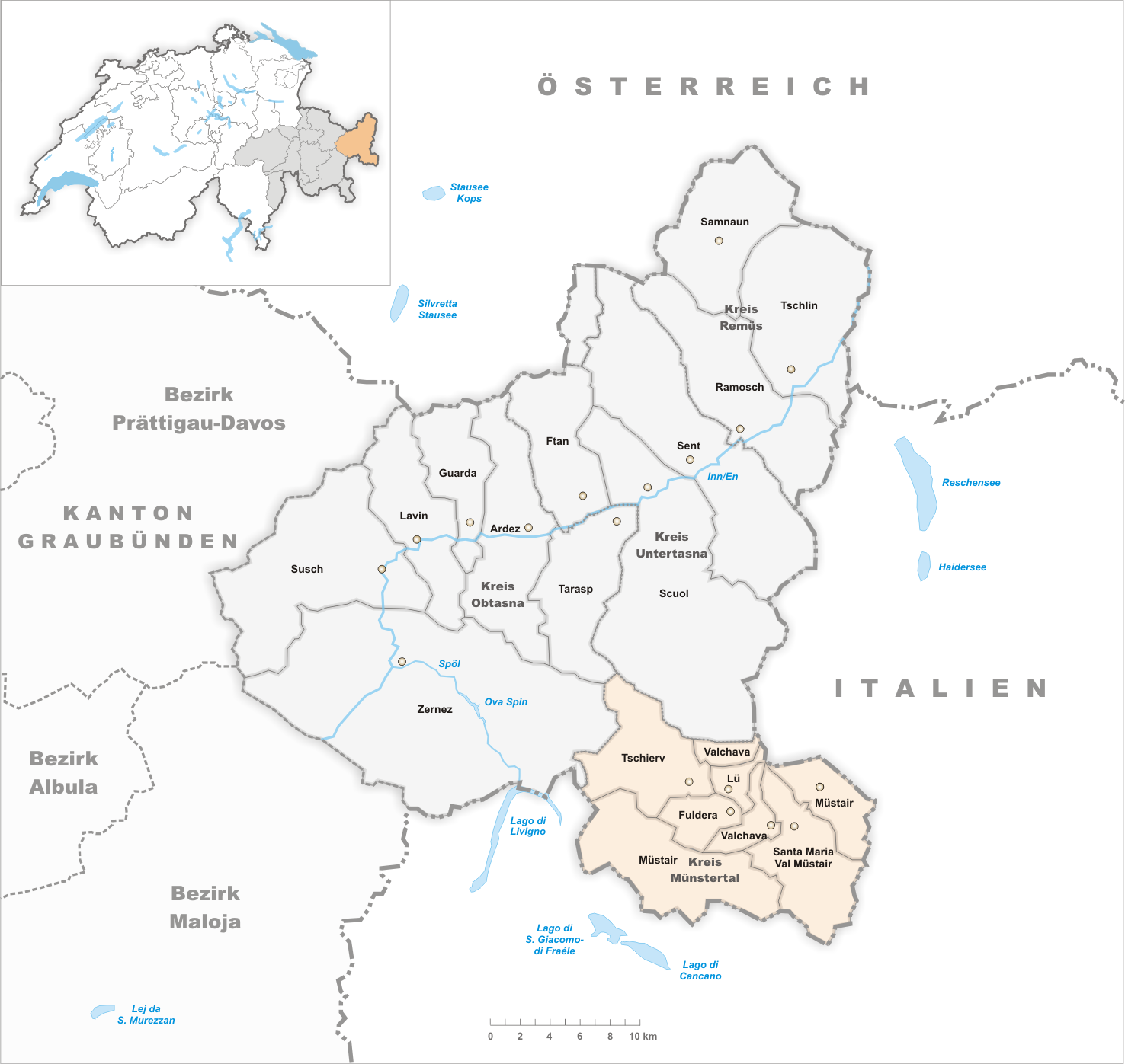 Gemeindefusionen auf den 01.01.2009.